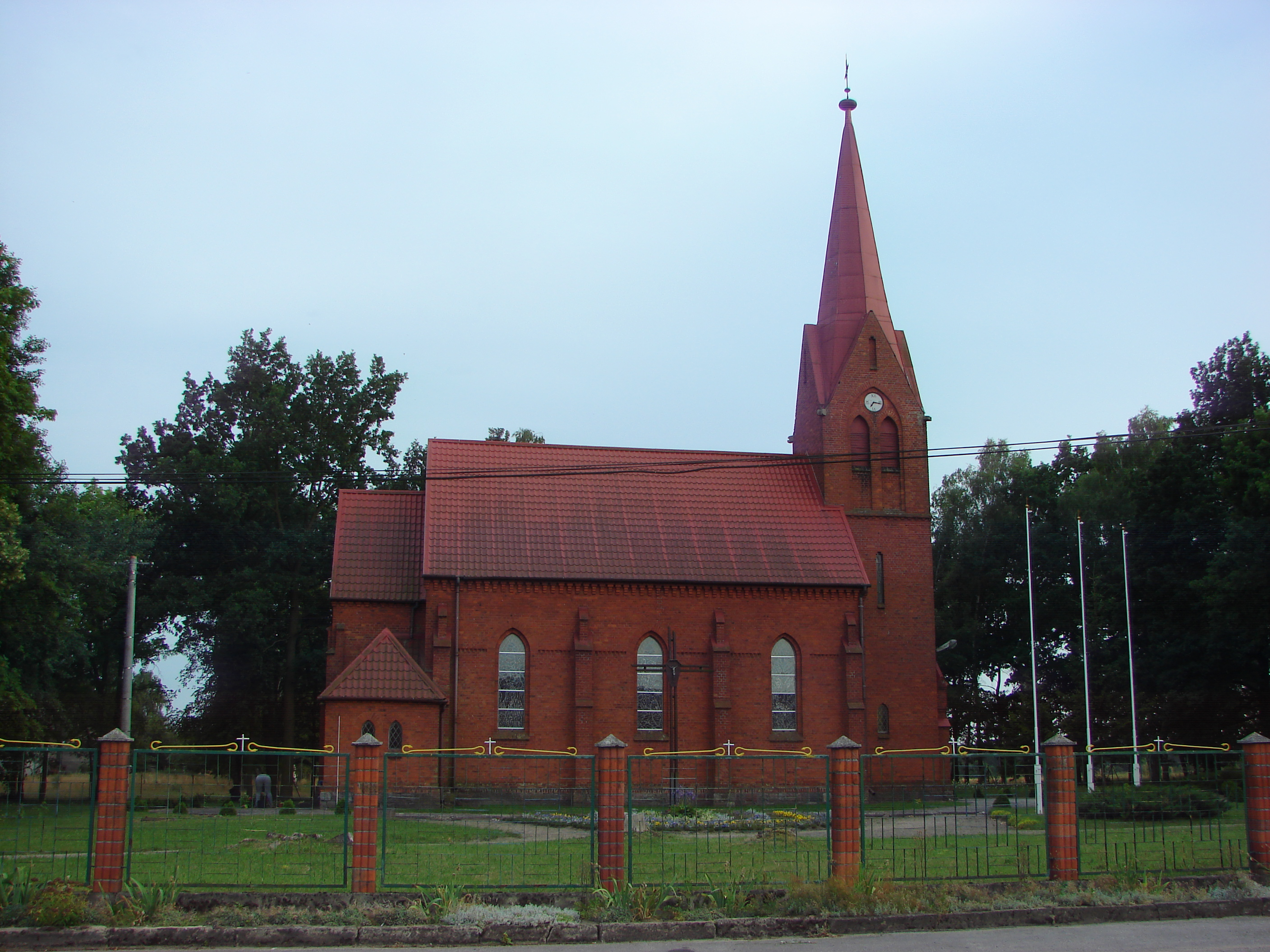 Jeziora Wielkie - kościół